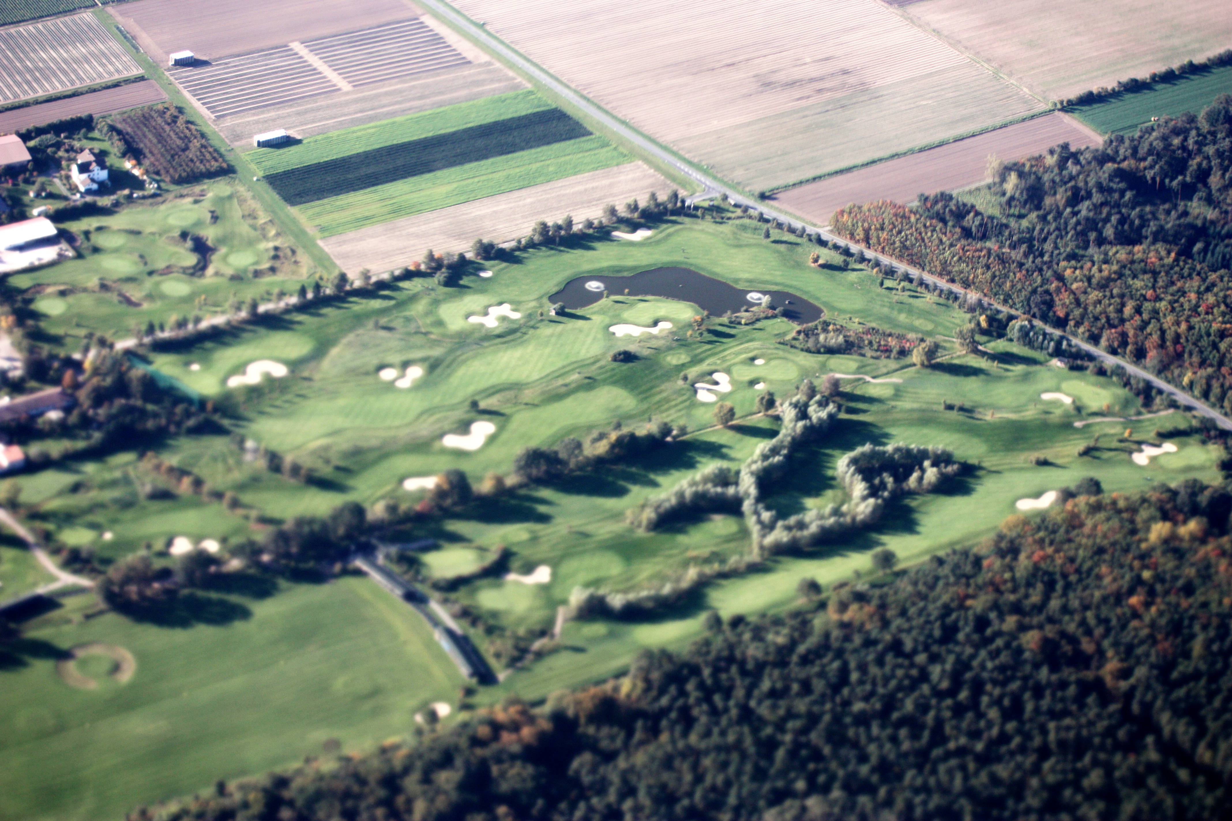 1 Flug von Frankfurt/Main nach Sofia; Start 10:12 MEZ; Landung 13:06 MEZ; Oktober 2010; Golfplatz bei Büttelborn/Worfelden